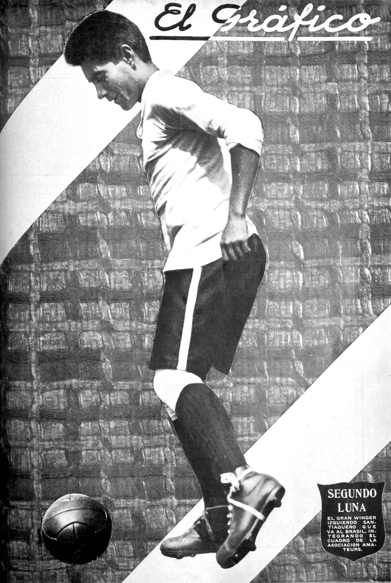 El Grafico del 06 de Noviembre de 1926. Edicion 383